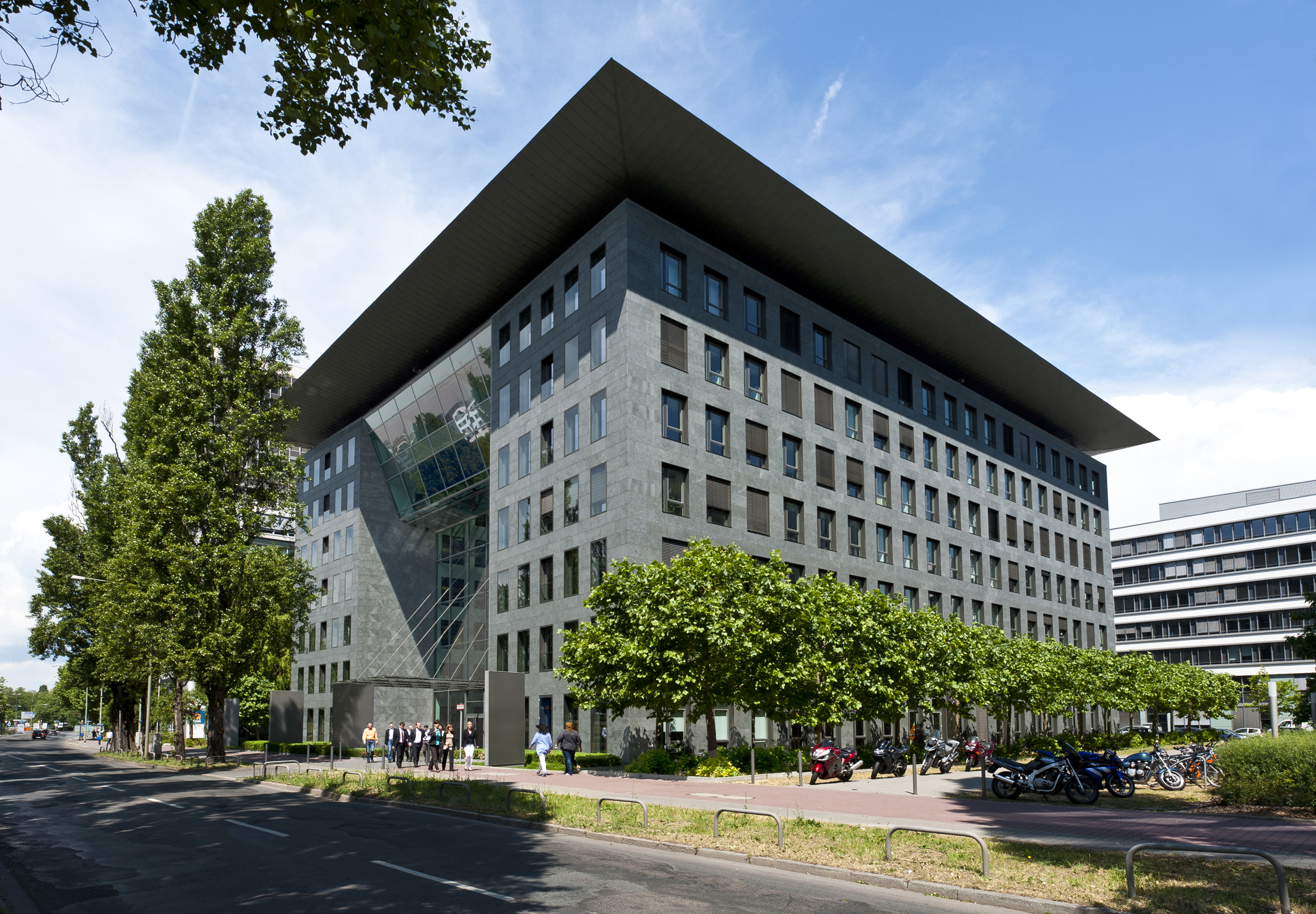 THEO 106 ist eine Büroimmobilie in der Theodor-Heuss-Allee 106 in Frankfurt am Main